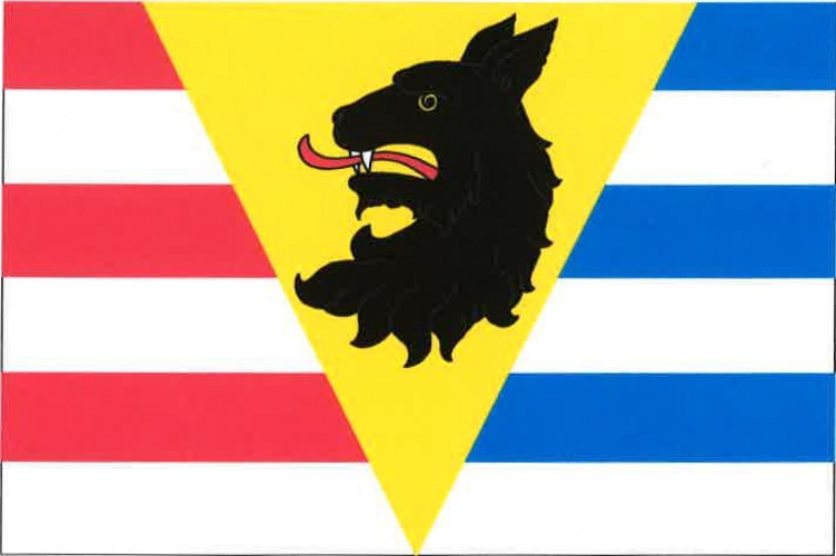 vlajka, Všetaty, okres Mělník